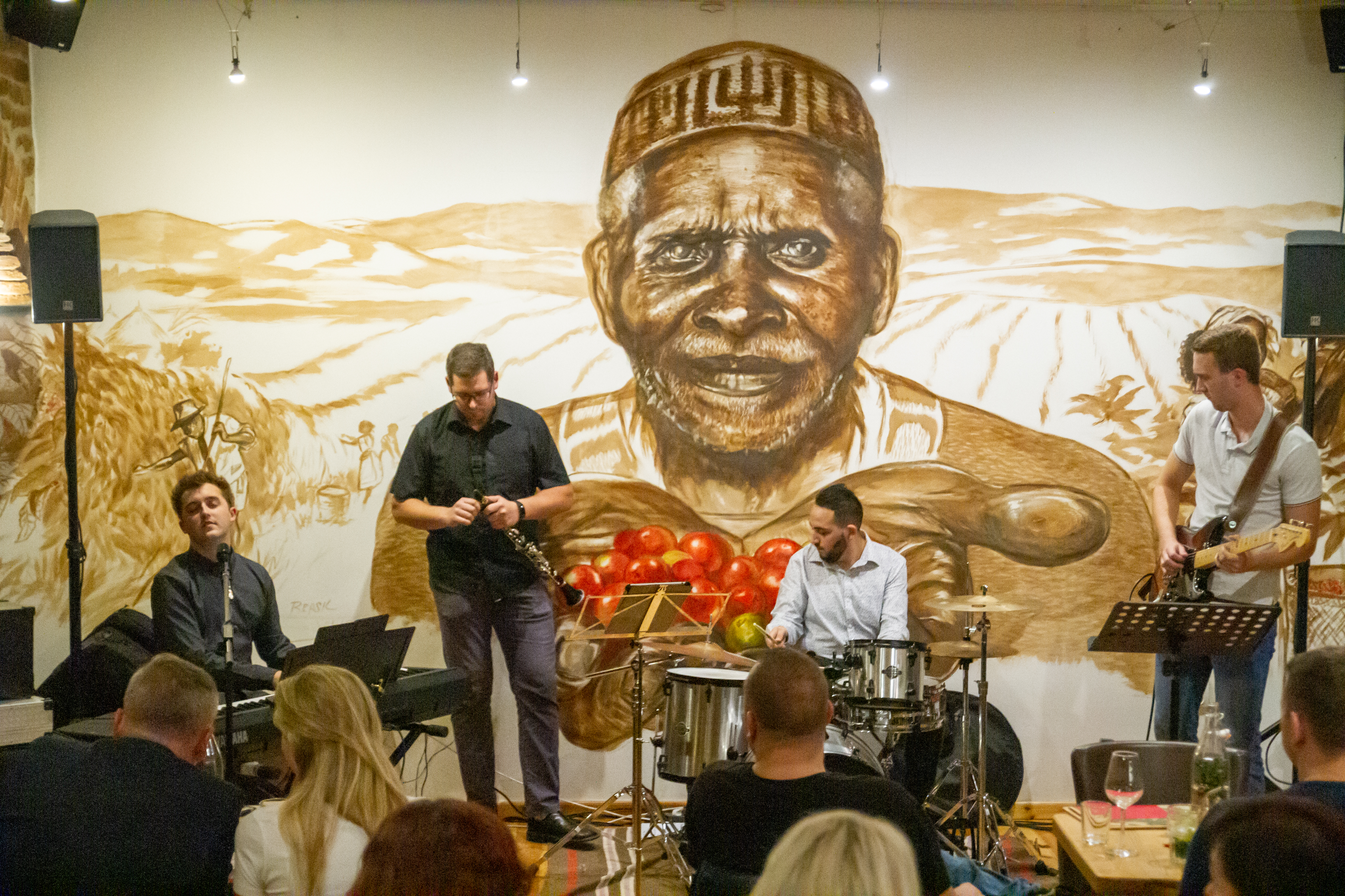 Foto: Martin Reihs